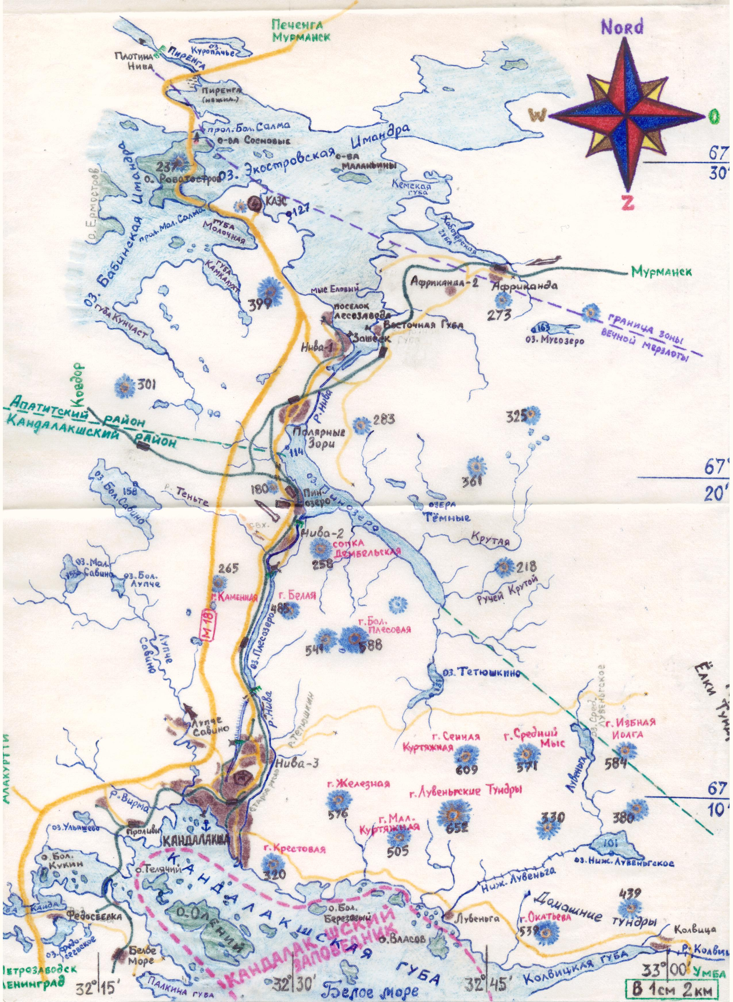 План-двухкилометровка Кольского полуострова от Кандалакши до плотины Нива ГЭС по состоянию на 1980-е годы. В середине карты сверху вниз Кольская атомная электростанция, Полярные Зори, посёлки Нивский-1, -2, -3, Кандалакша. Автодороги оранжевые, железные дороги тёмно-серые, реки синие. Рядом с сопками подписаны их названия (если есть) и высота. Белой ракетой возле Пинозера отмечен район сосредоточения перед выходом на разные позиции в лесу трёх дивизионов ныне не существующей шестой отдельной армейской ракетной бригады шестой общевойсковой армии (штаб бригады в Пинозеро, штаб армии в Петрозаводске). Чуть выше прямоугольник - технический парк бригады, через дорогу - гарнизон. В Кандалакше звездой отмечен военный городок и военный госпиталь, якорем и причалом - порт. В Лупче Савино чёрной ракетой отмечена ракетная бригада. В Африканде - военный аэродром ныне не существующего истребительного полка.